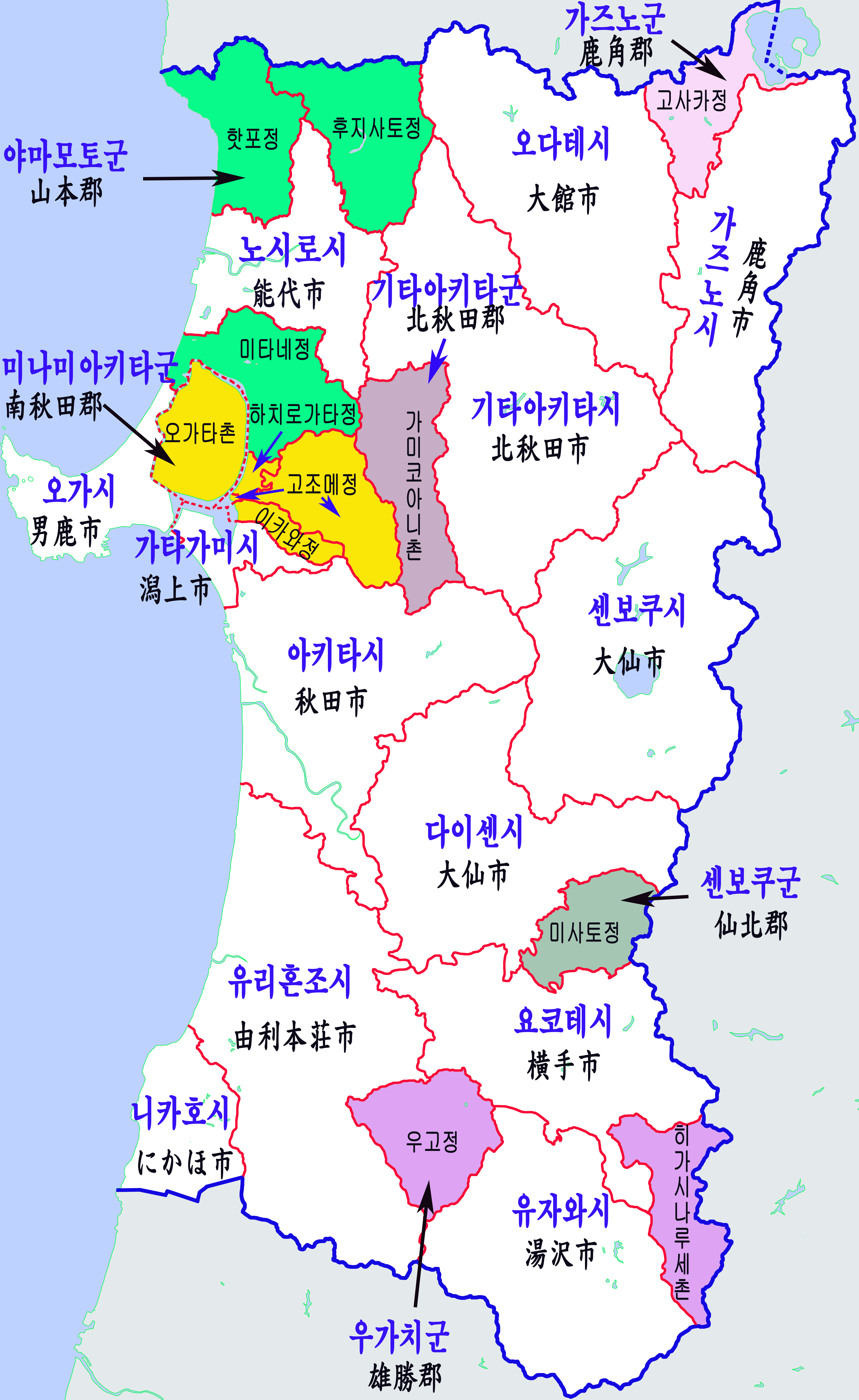 아키타현 행정구역